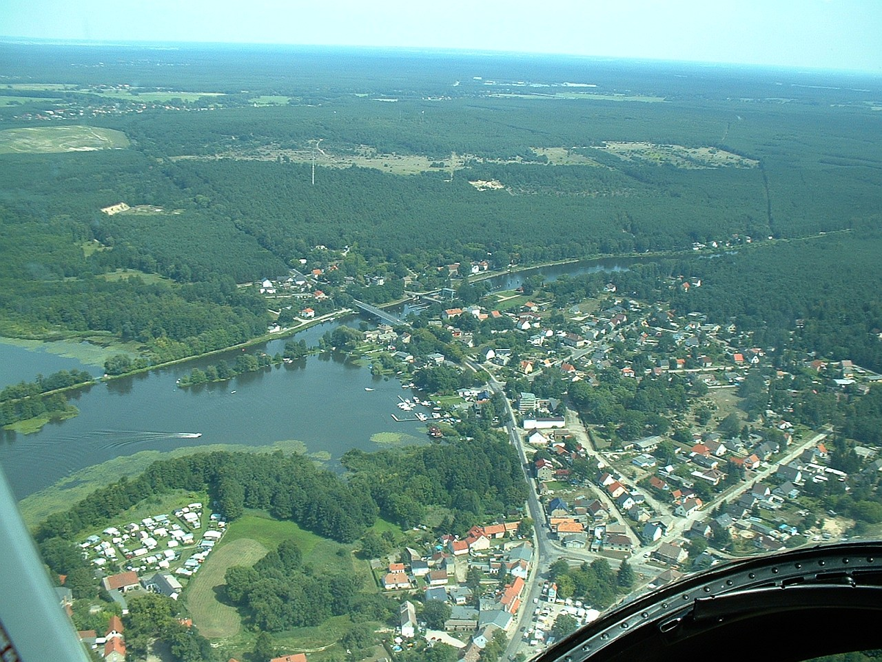 Luftbild vom nordöstlichen Teil von Wernsdorf